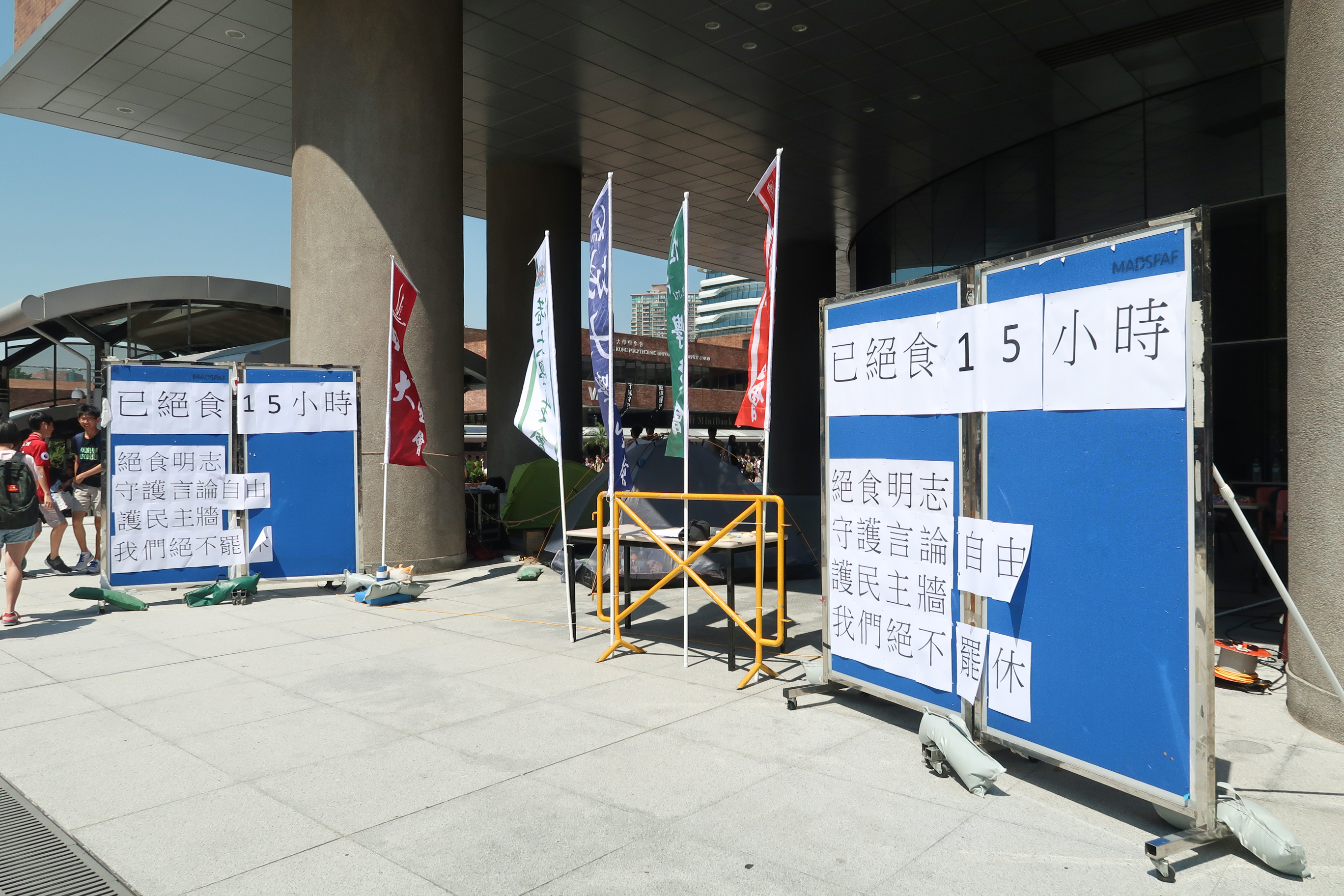 PolyU students hunger strike